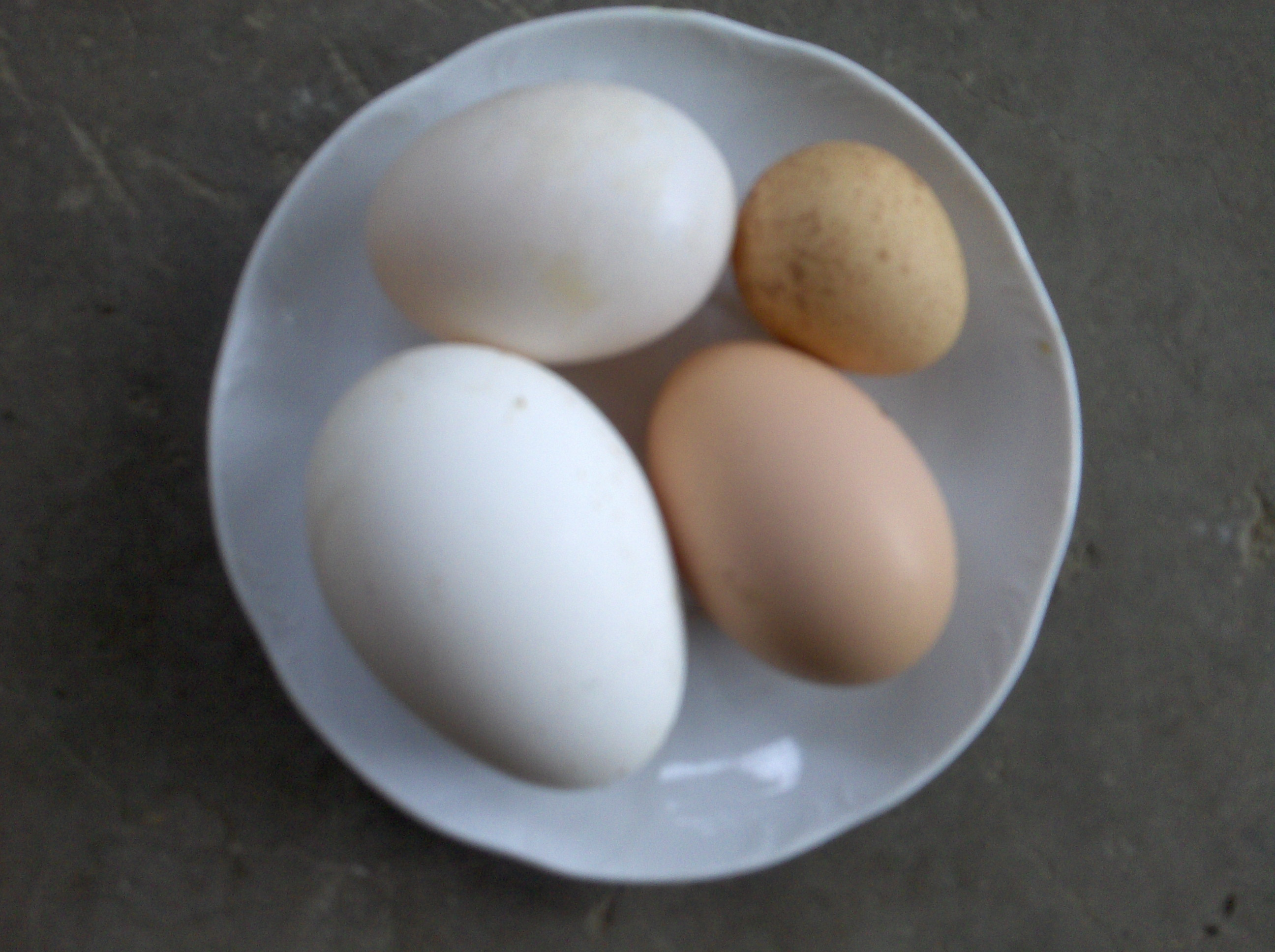 cuatro huevos :uno de gallina,uno de oca,uno de pato y uno de pintada